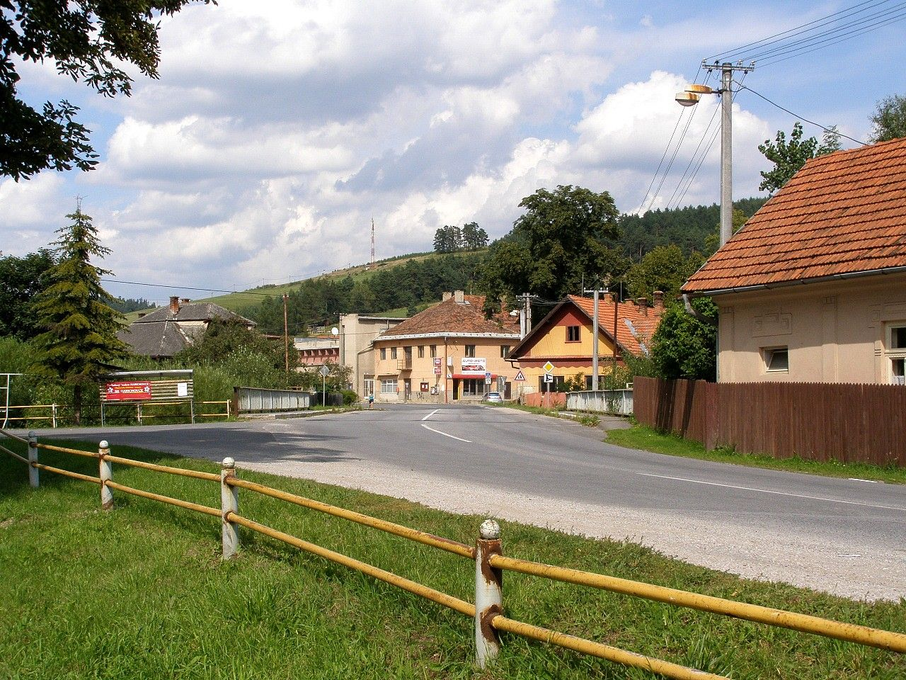 Centrálna časť obce